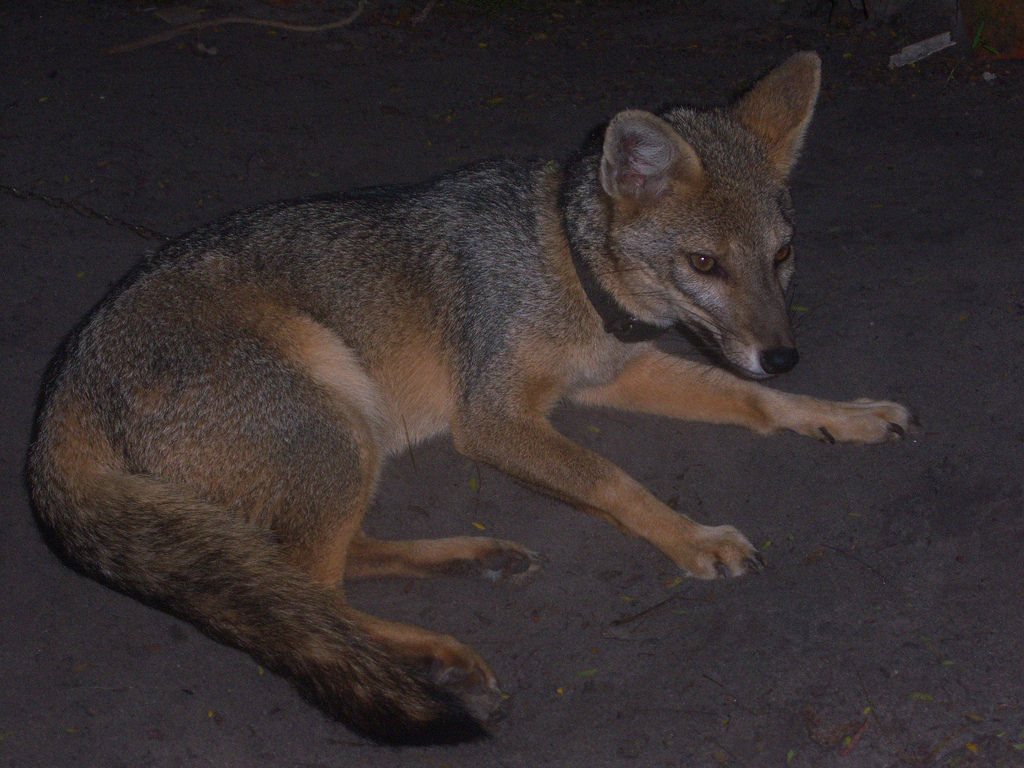 Uma raposa domesticada no interior do Ceará